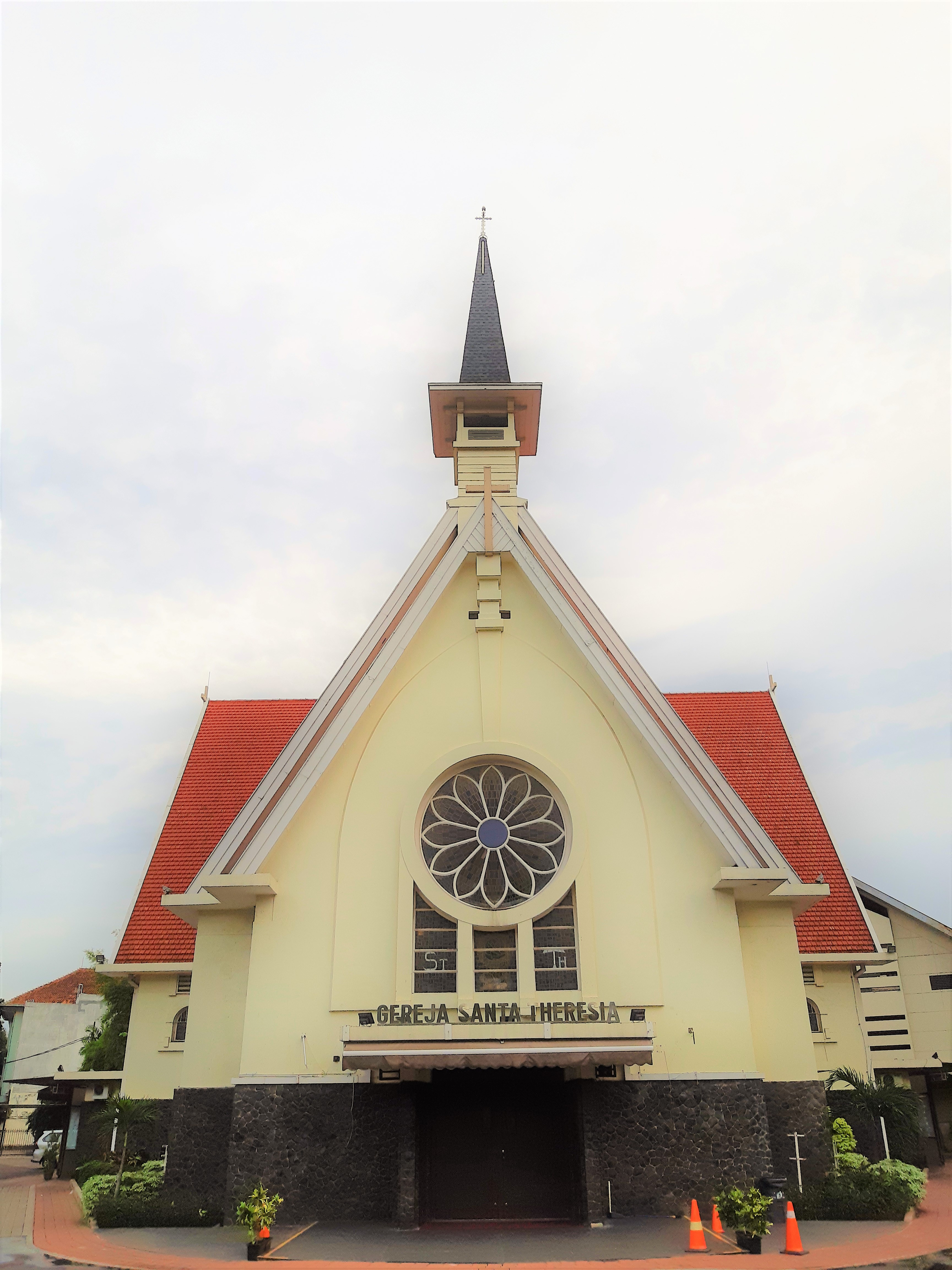 Tampak luar Gereja Santa Theresia Menteng